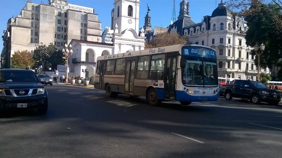 Colectivo de la línea 86 pasando por Plaza de Mayo